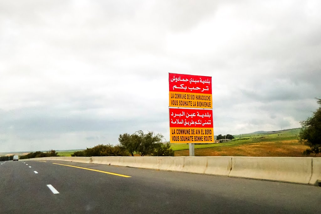 بلدية سيدي حمادوش